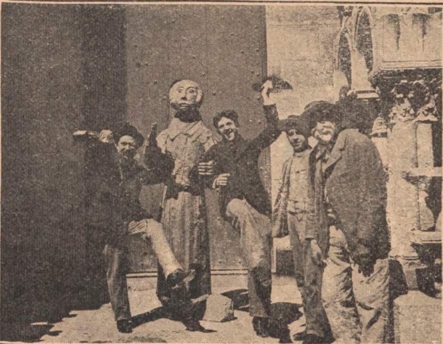 Devant l'Atelier des réparations de la Cathédrale de Reims, près des bureaux de l'Architecte; de gauche à droite : le Statuaire Auguste Coutin et le Sculpteur Eugène Bourgoin, le jeune apprenti Fivet et le Père Doucet, Doyen des Sculpteurs de la Cathédrale de Reims